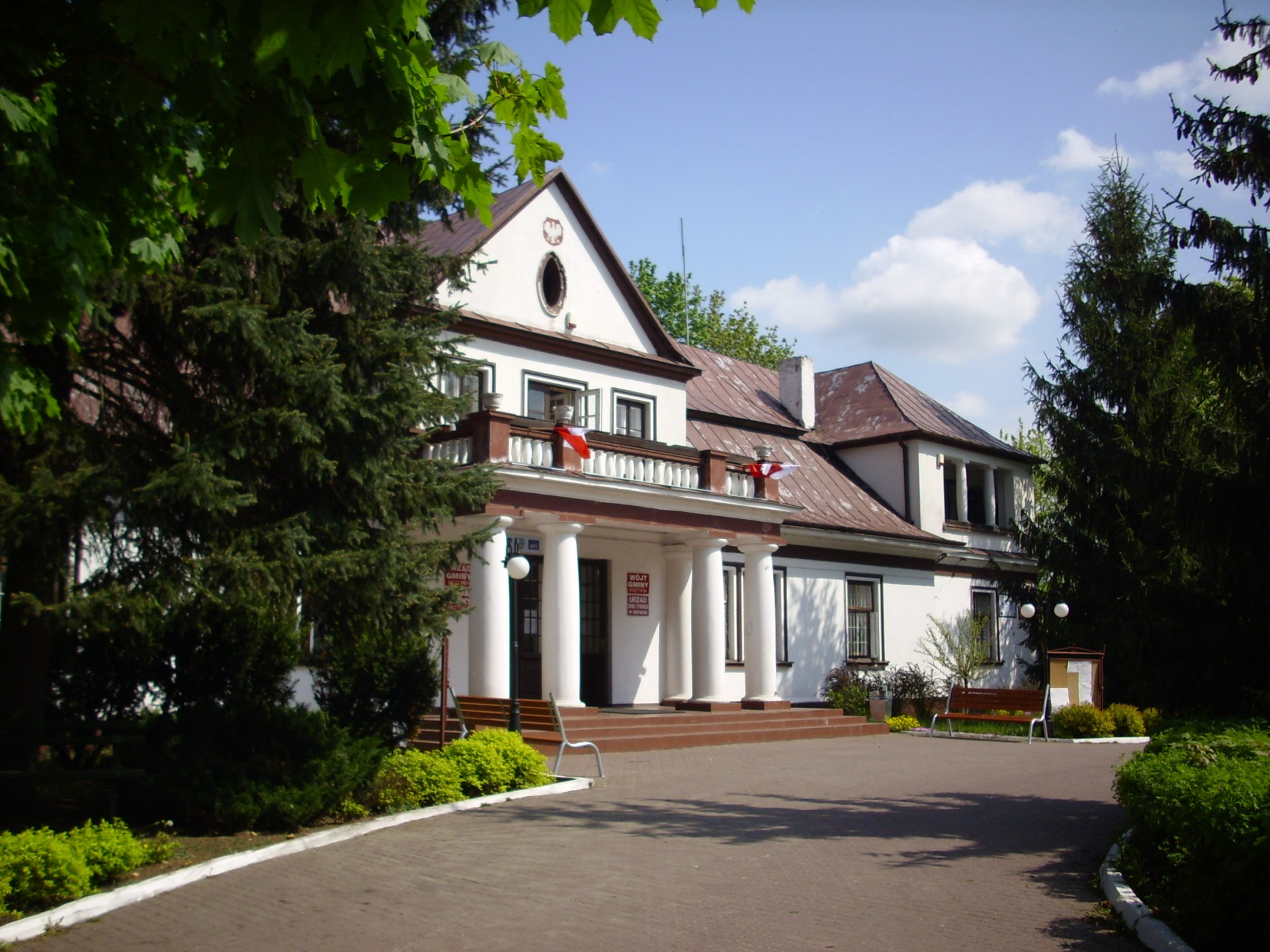 Dwór w Krzywdzie (woj. lubelskie). Obecnie Urząd Gminy.